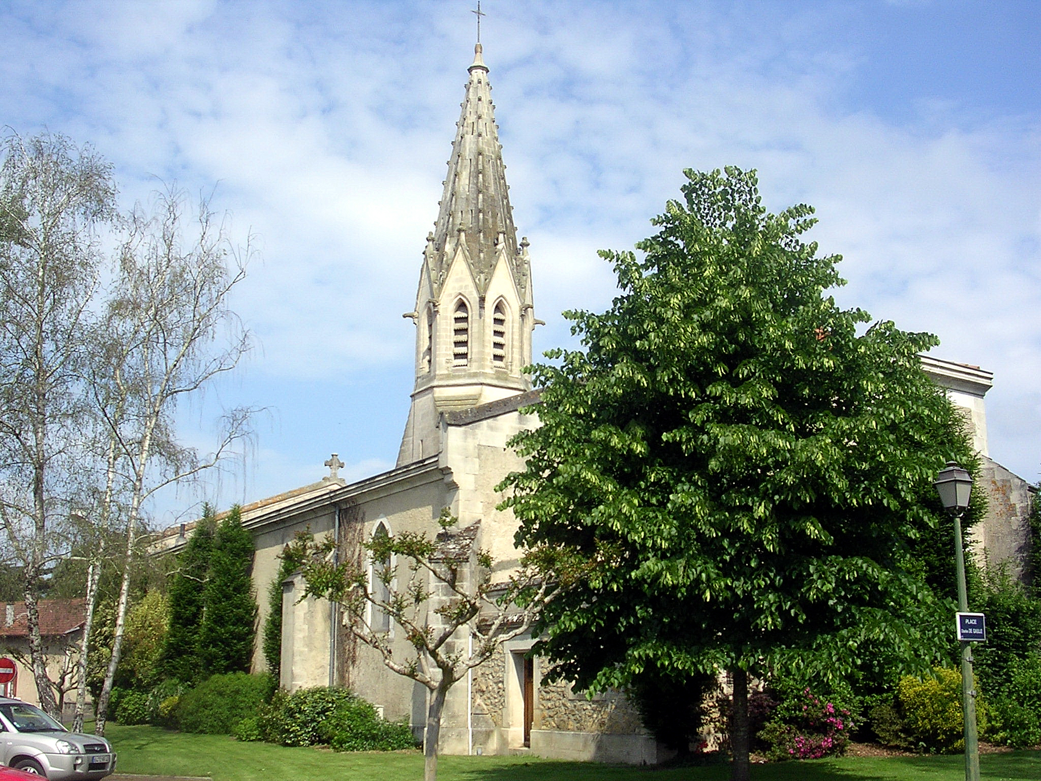 Eglise St Martin de Biscarrosse, dans le département français des Landes